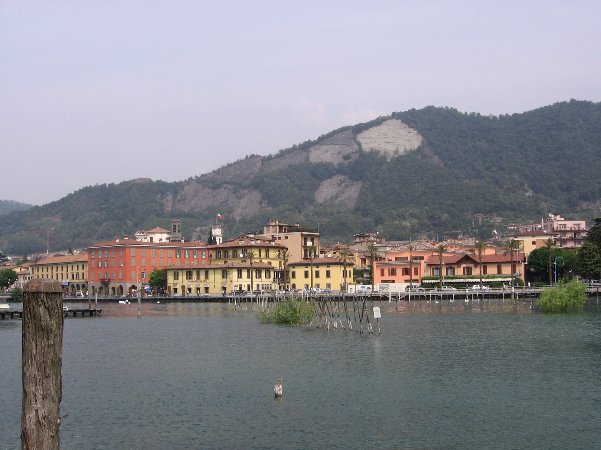 Sarnico, Bergamo, Italia